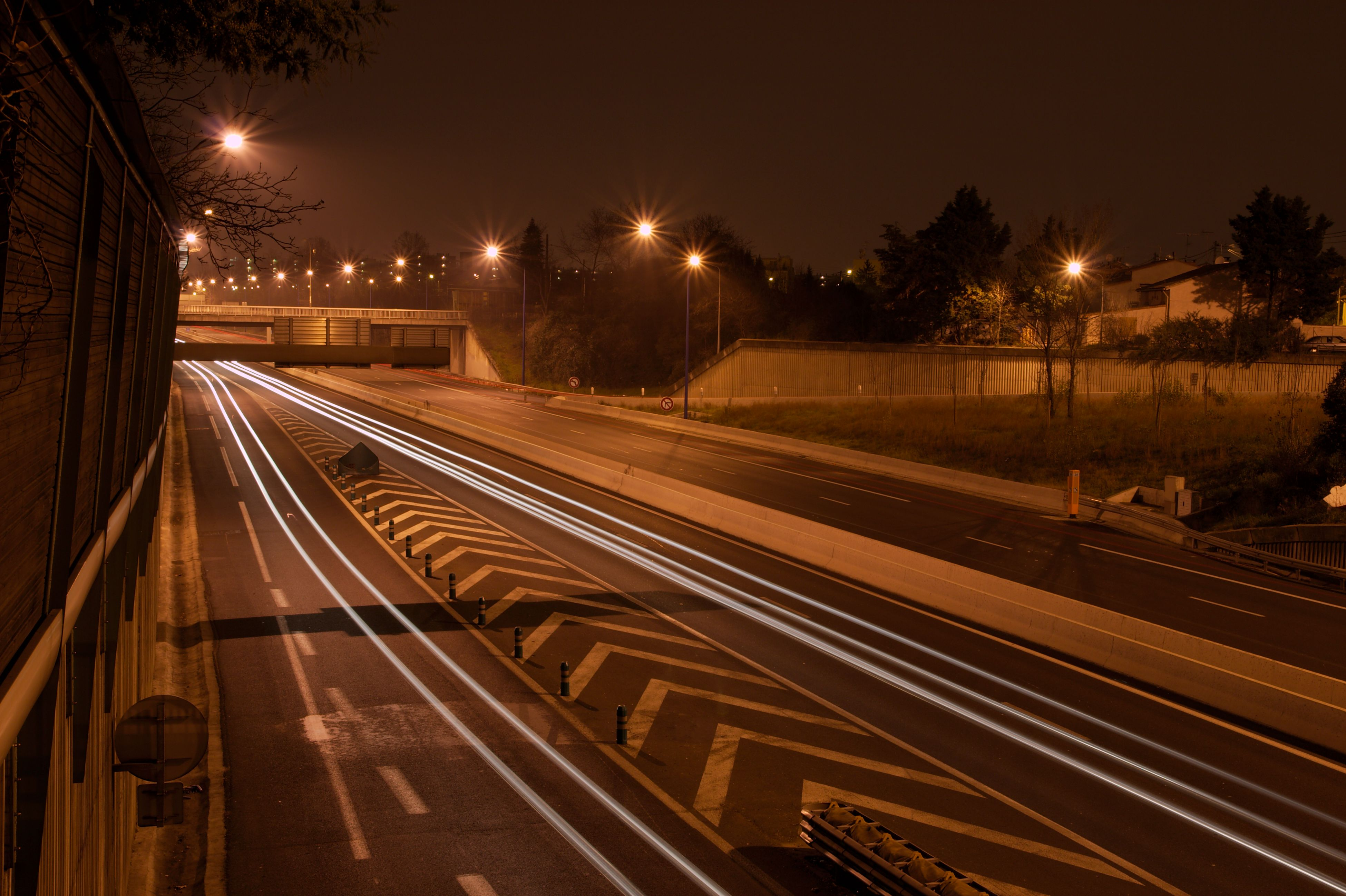 Toulouse, rocade de nuit près de Rangueil.